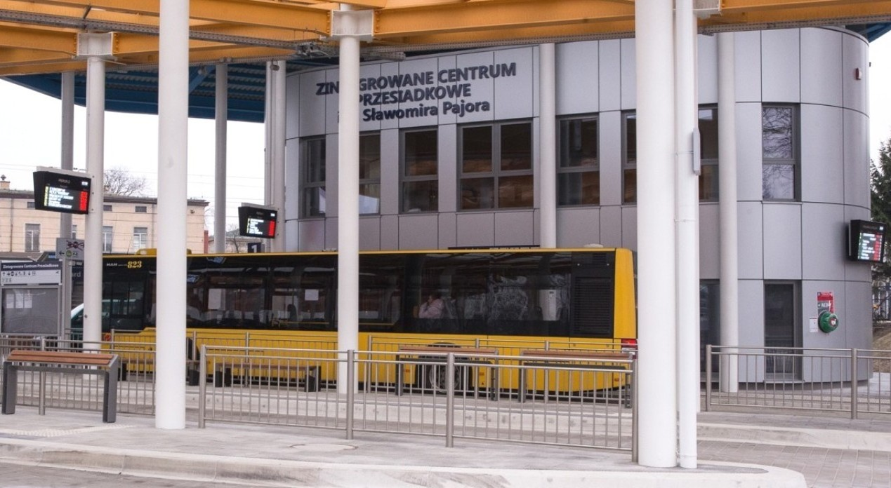 Zintegrowane Centrum Przesiadkowe w Stargardzie